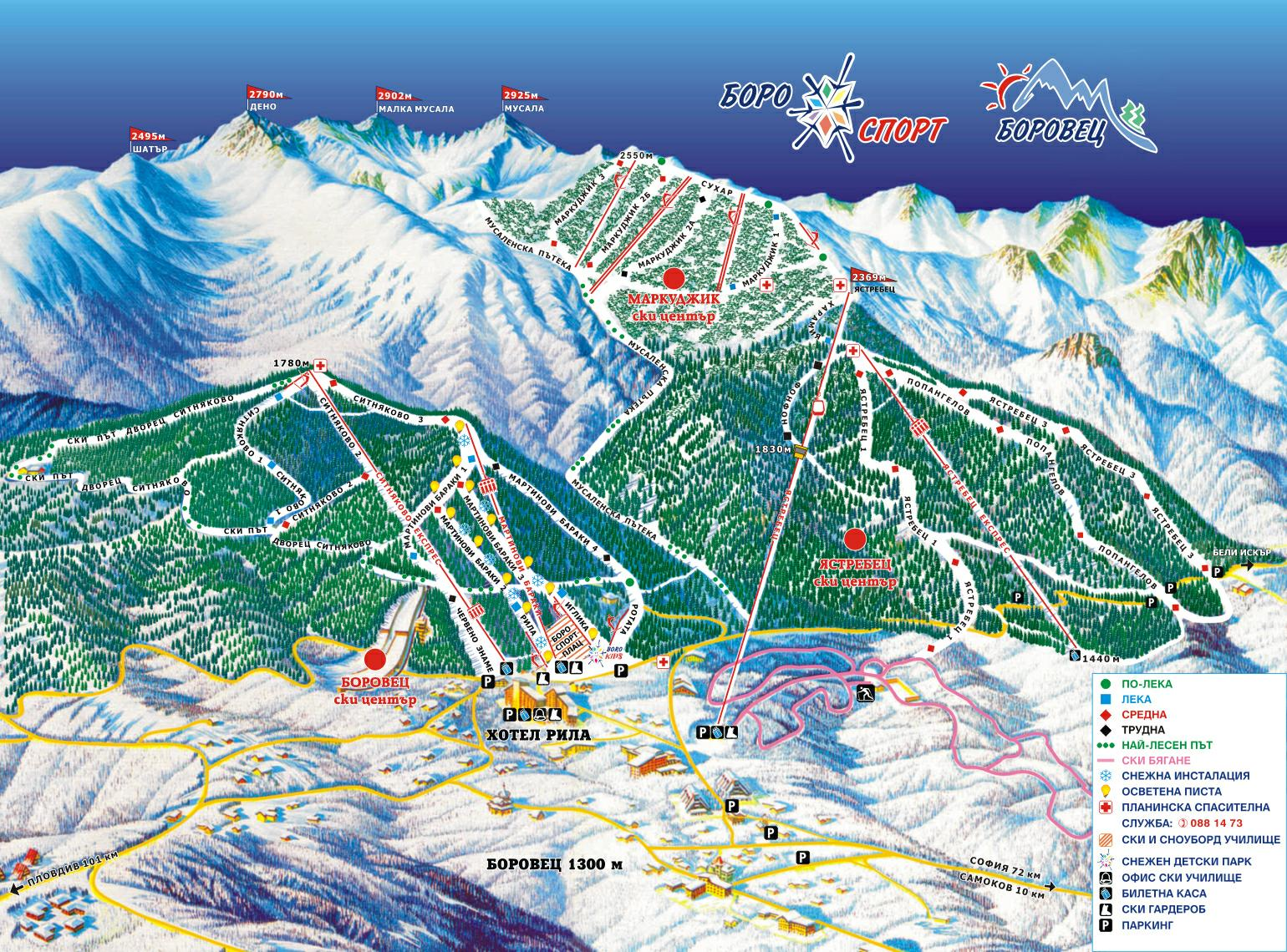 Borovetz_46_bg.jpg